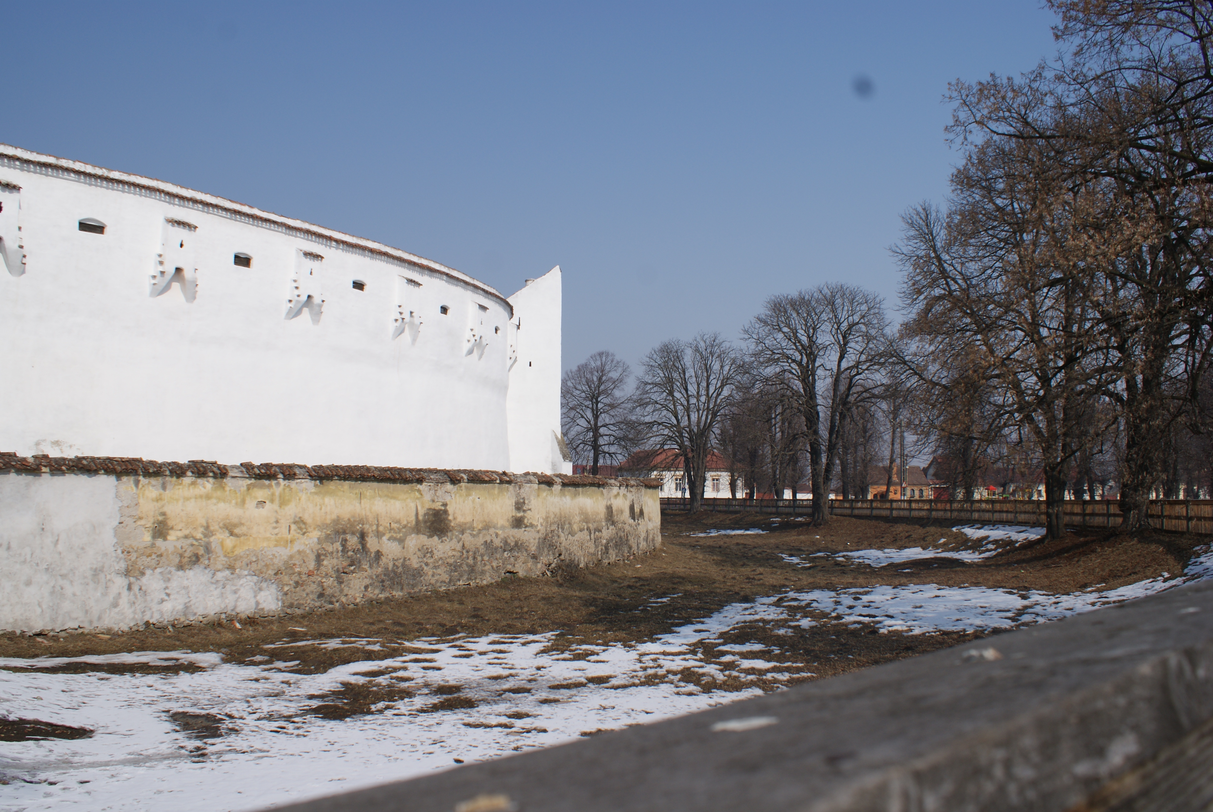 Șanțul fortificației 04